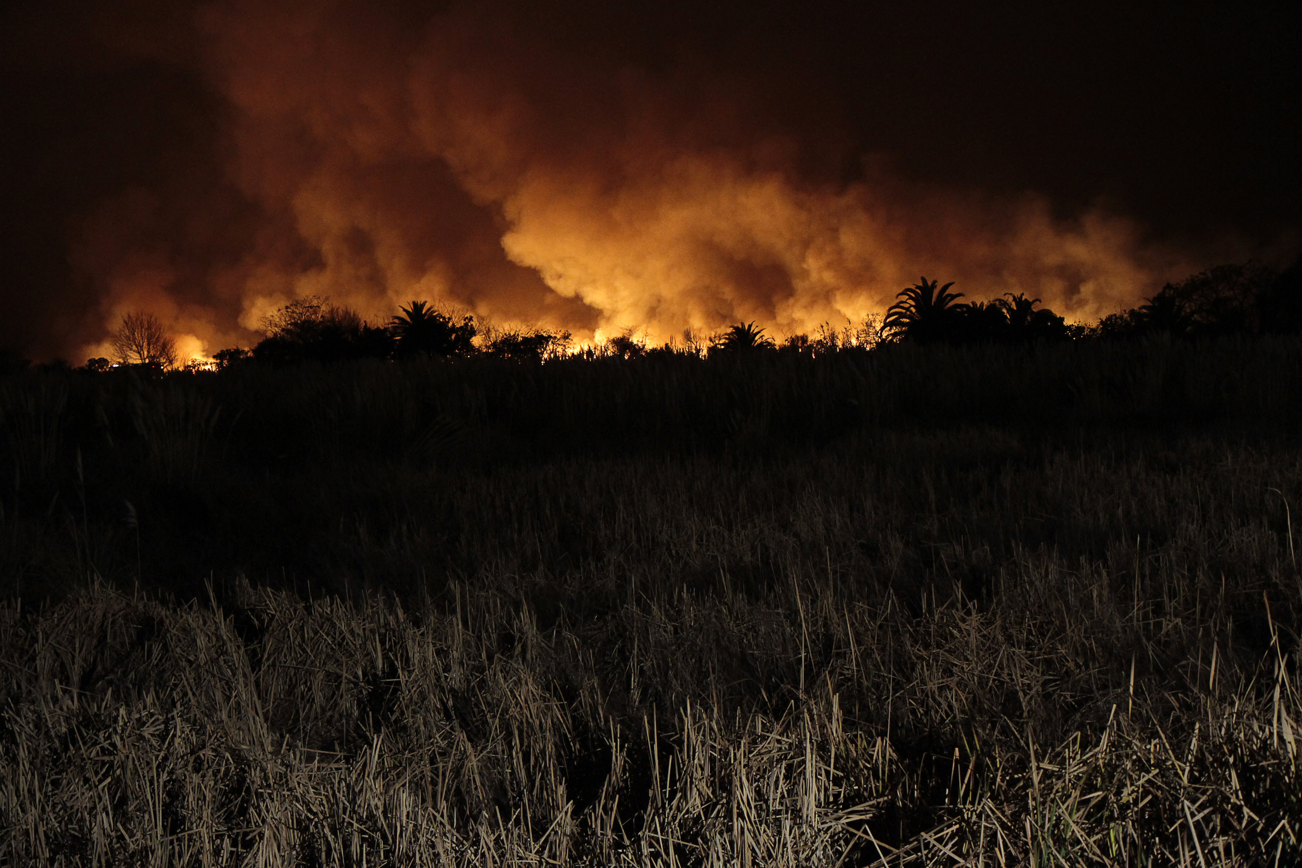 Buenos Aires. Julio 31 de 2013.- El jefe de Gobierno de la Ciudad de Buenos Aires, Mauricio Macri, Estuvo hoy observando de cerca las tareas que se realizaron para sofocar el incendio que se desató en la Reserva Ecológica. Foto: Nahuel Padrevecchi/GCBA